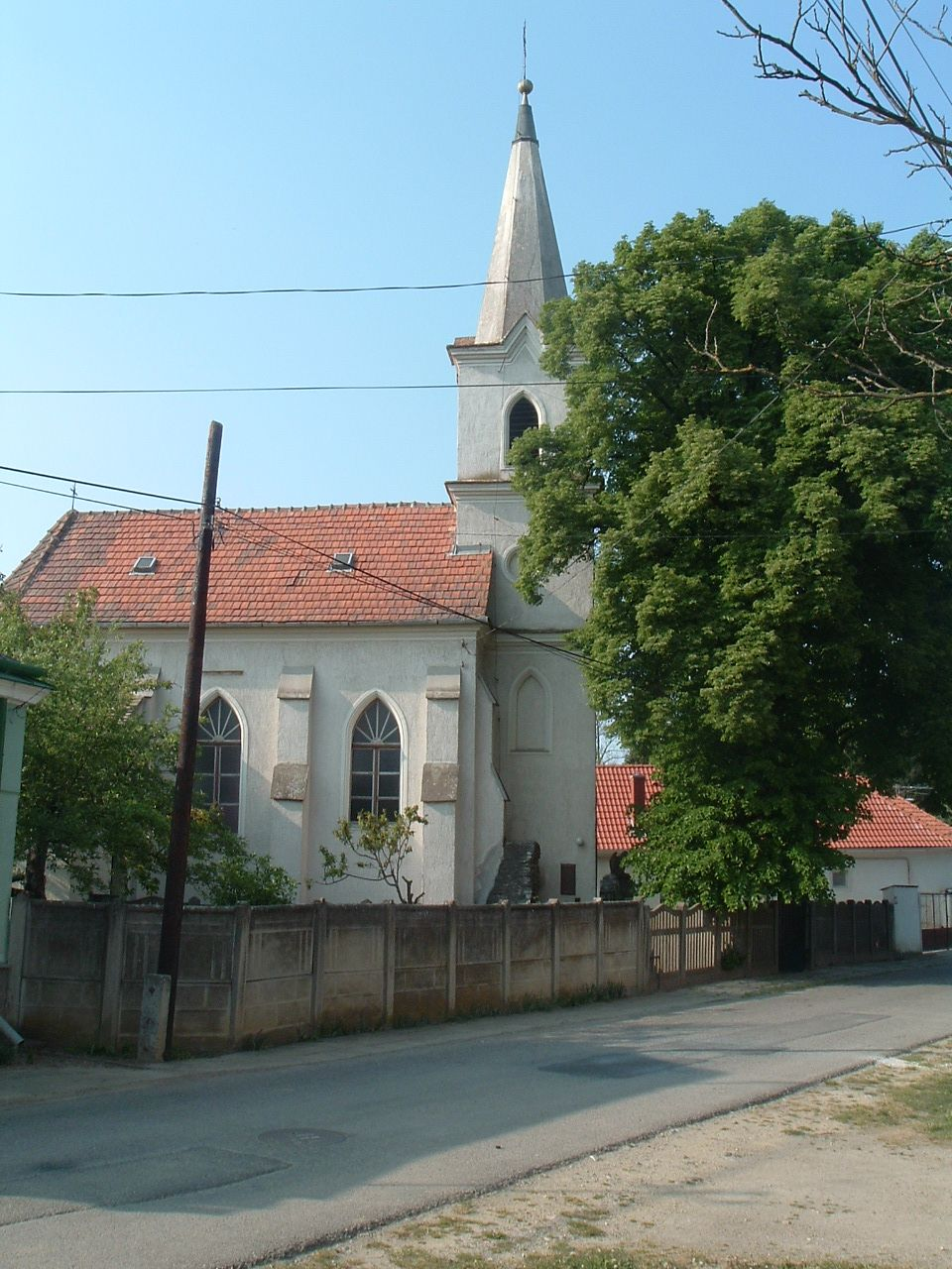 Gencsapáti, Church of Gyöngyösapáti, Szent István király templom